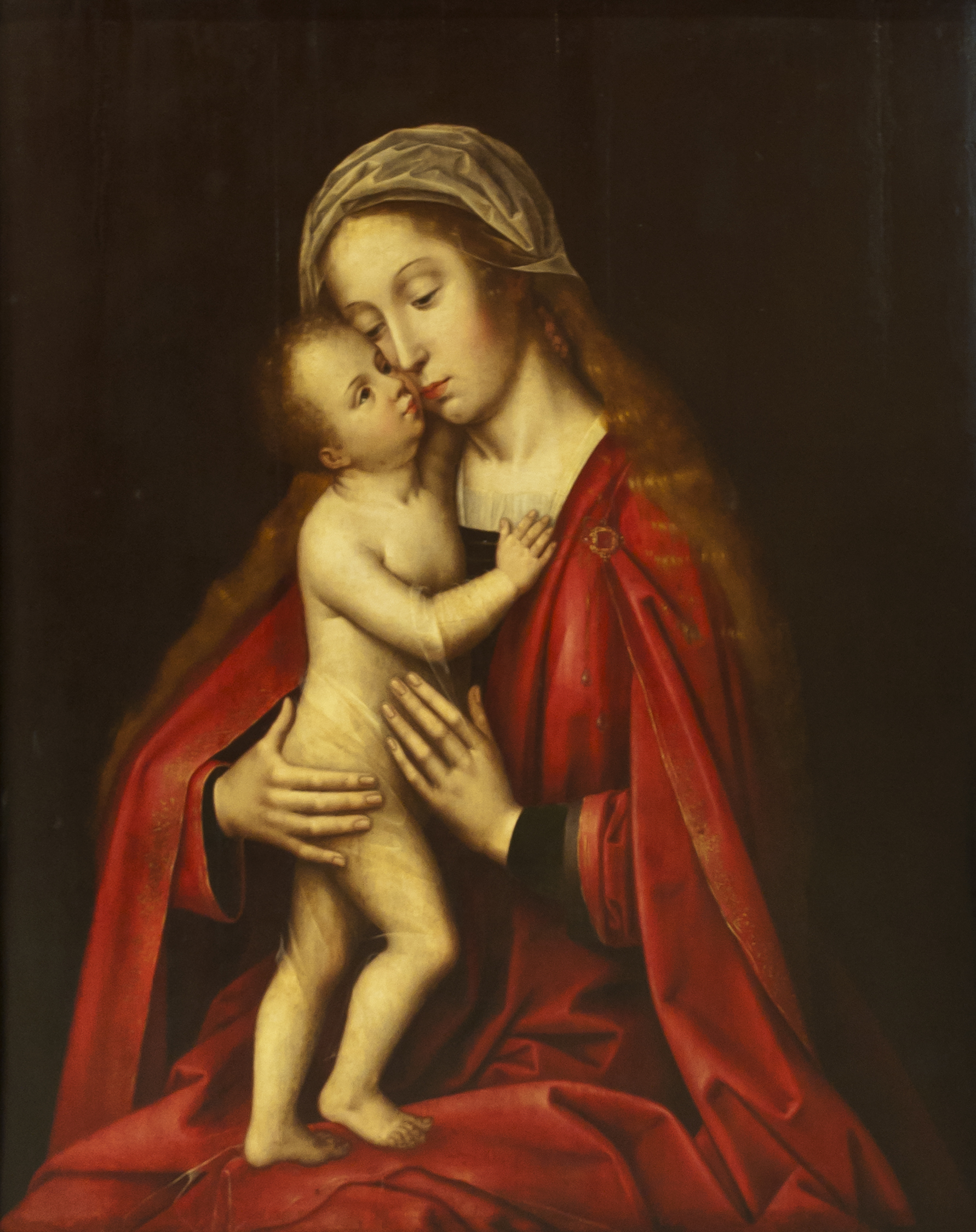 La obra representa a la Virgen María llevando en brazos a su hijo, el Niño Jesús.